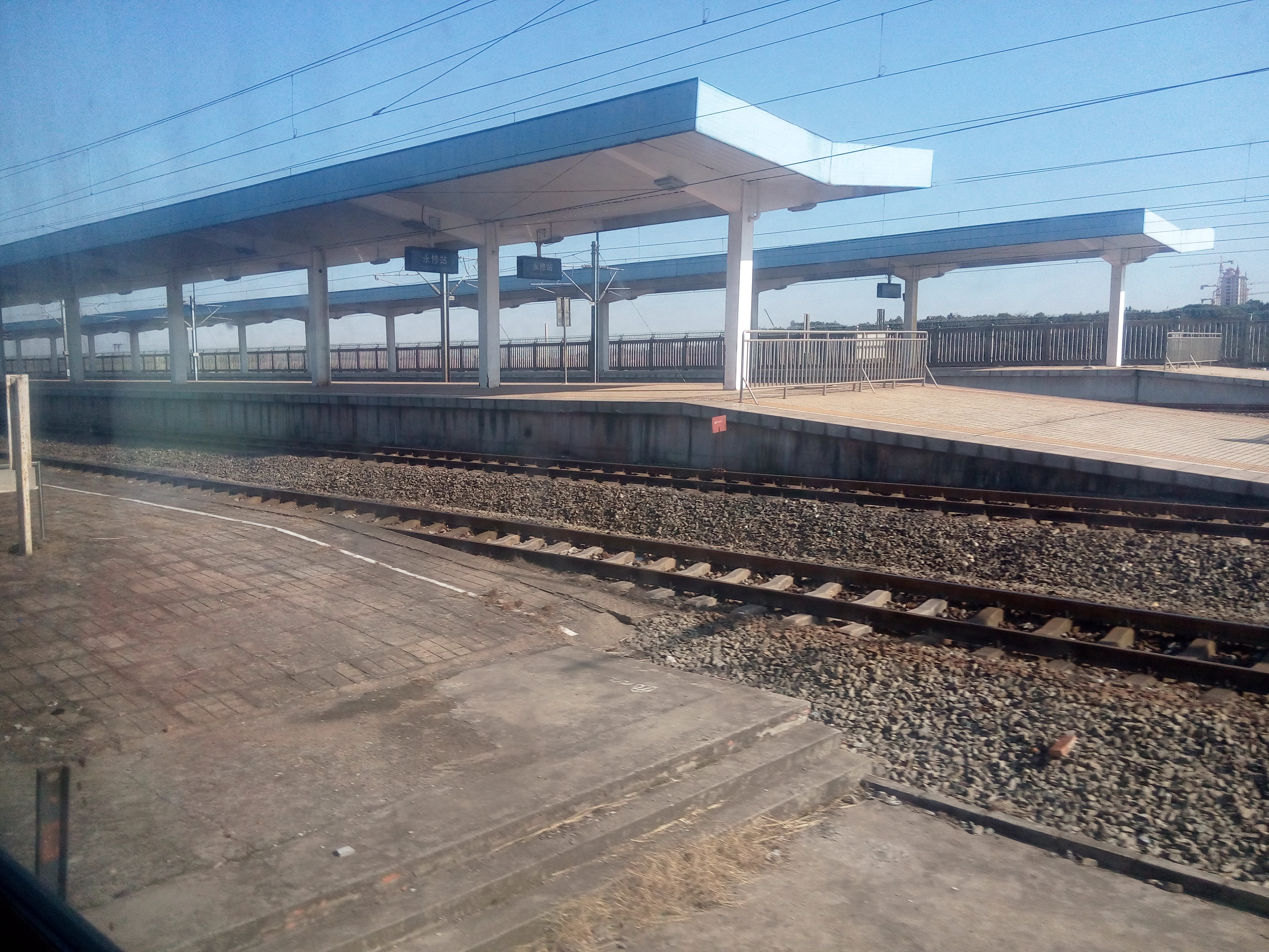 驶过永修站2站台列车图中还可以看到3、4、5、6站台